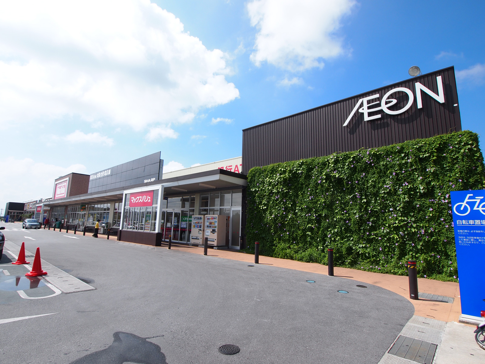 イオンタウン宮古南ショッピングセンター